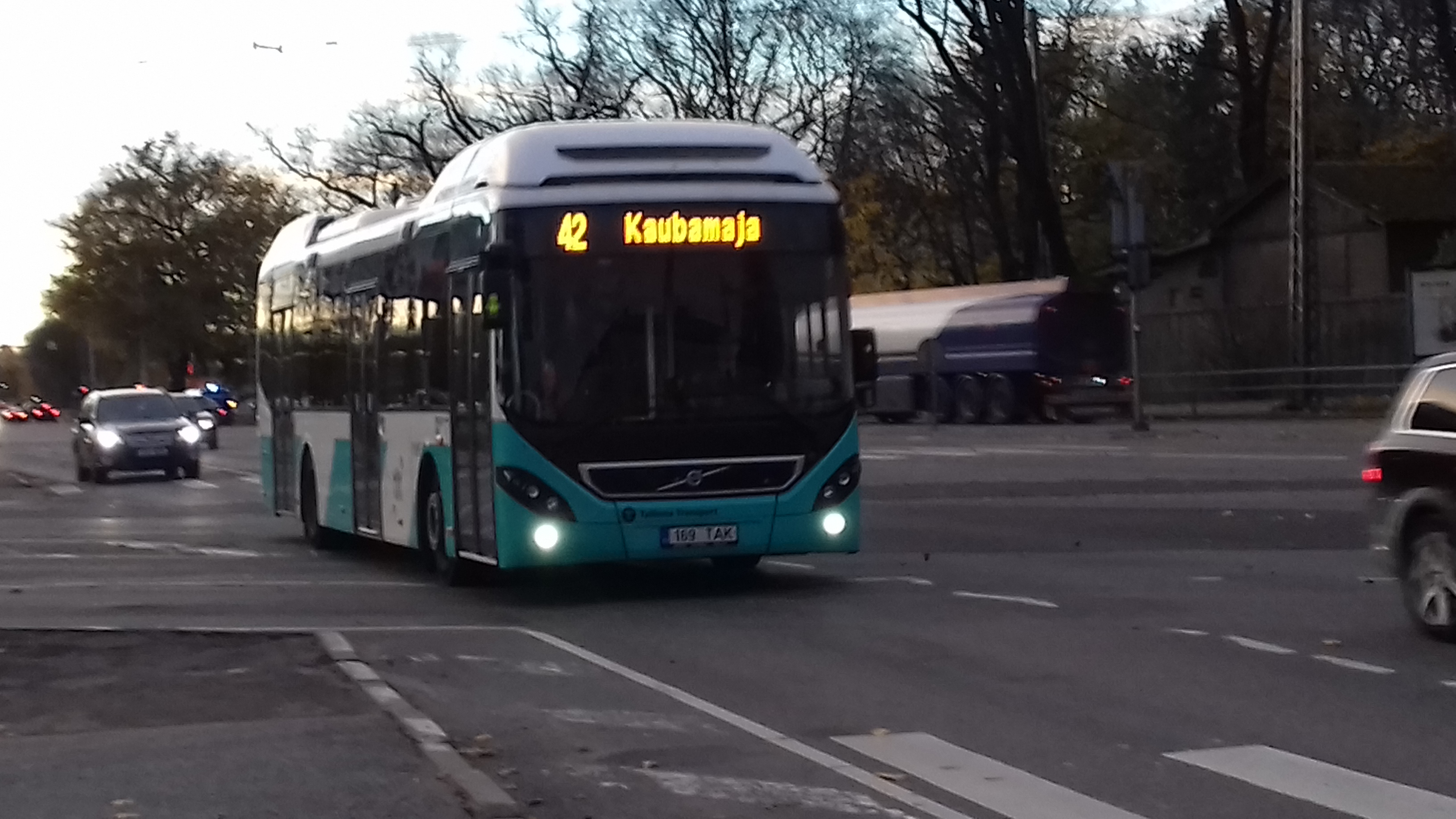 42 bussiliin Paldiski mnt ja Mustamäe tee ristil